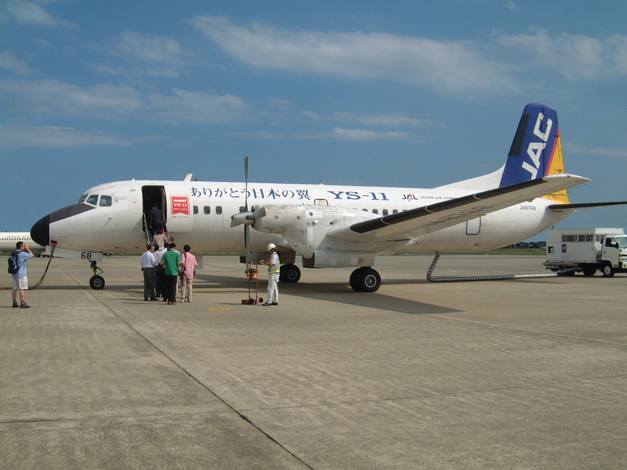 YS-11 日本最終塗装